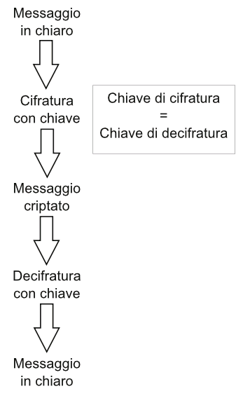 La crittografia simmetrica utilizza una stessa chiave sia per cifrare il testo, sia per decifrarlo, anche se questa operazione avviene in momenti e "luoghi" distinti.